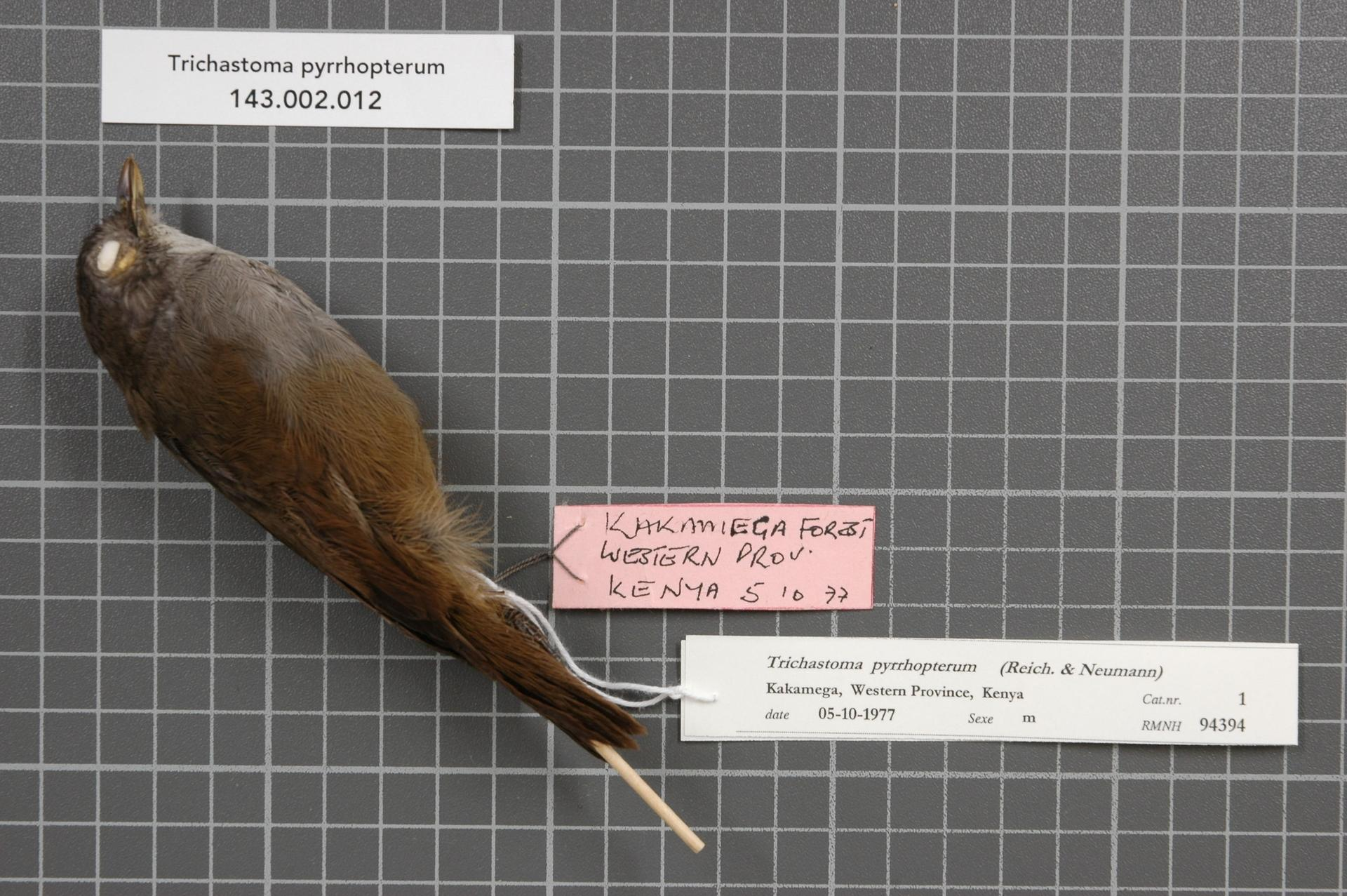 Trichastoma pyrrhopterum (Reichenow and Neumann, 1895)